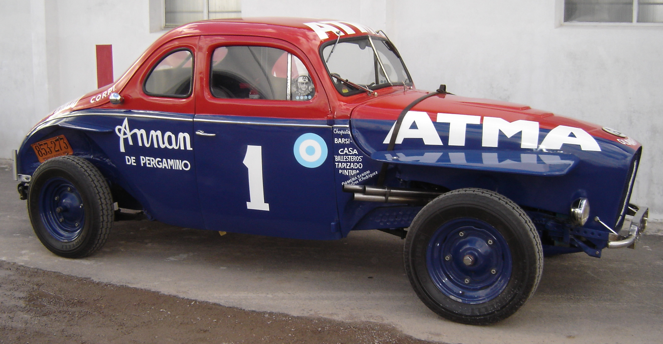 es la coupé Ford llamada "La Galera" de los argentinos Dante y Torcuato Emiliozzi, hermanos Olavarrienses pilotos y mecánicos del Turismo Carretera. Modificaron el Ford de manera artesanal, tanto su carrocería como algunas partes del motor, creando un motor con 4 válvulas a la cabeza.